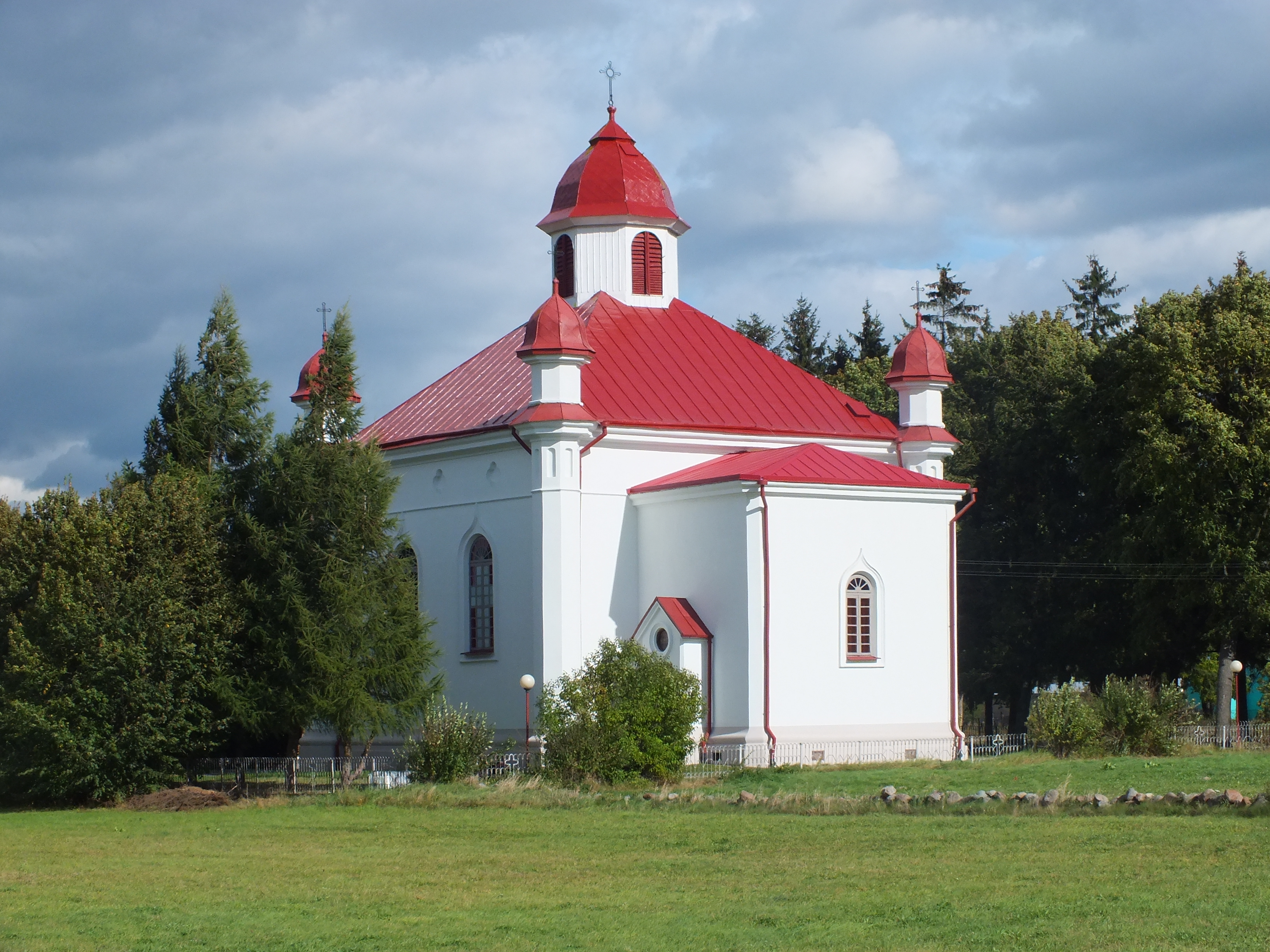 Klonownica Duża, cerkiew unicka, ob. kościół rzym.-kat. par. p.w. św. Jana Ewangelisty, 1845, 1921